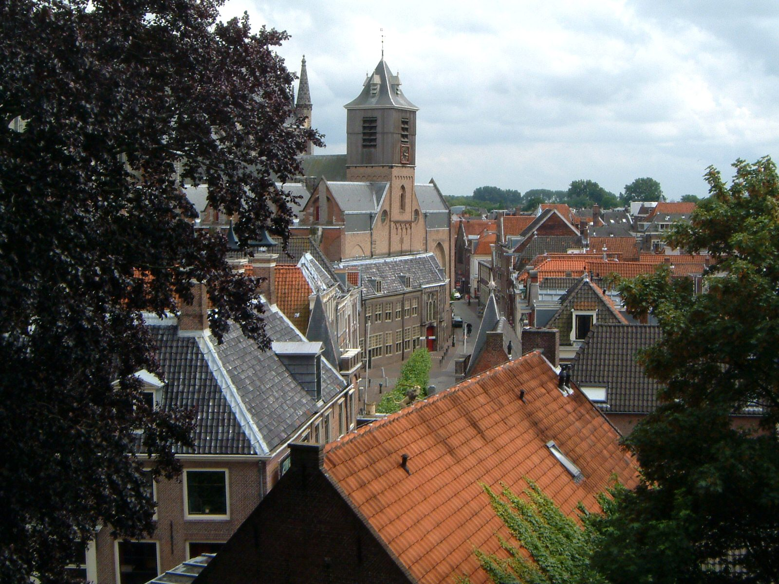 Front of the Hooglandse Kerk and Nieuwstraat in Leiden